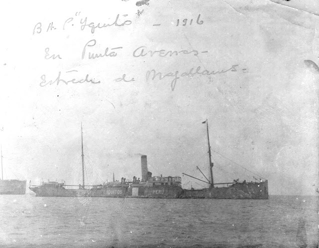 El transporte Iquitos, en 1916, en viaje a EEUU vía el Estrecho de Magallanes